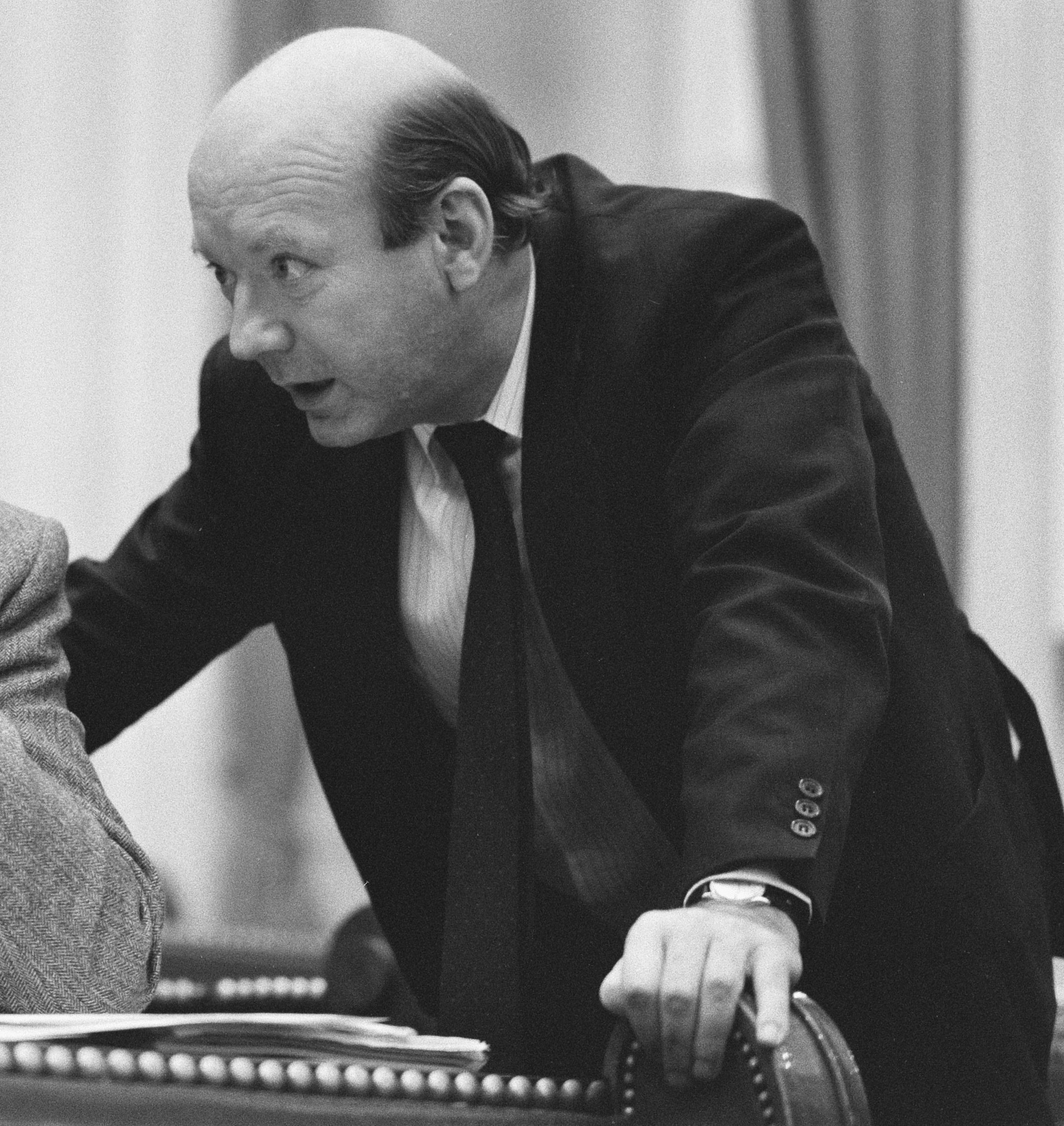 Collectie / Archief : Fotocollectie Anefo Reportage / Serie : [ onbekend ] Beschrijving : Tweede Kamer ; Flip Buurtmeijer (PvdA) en rechts Frans Wolter (CDA) Datum : 17 november 1987 Trefwoorden : politiek Instellingsnaam : CDA, PvdA, Tweede Kamer Fotograaf : Bogaerts, Rob / Anefo Auteursrechthebbende : Nationaal Archief Materiaalsoort : Negatief (zwart/wit) Nummer archiefinventaris : bekijk toegang 2.24.01.05 Bestanddeelnummer : 934-1302